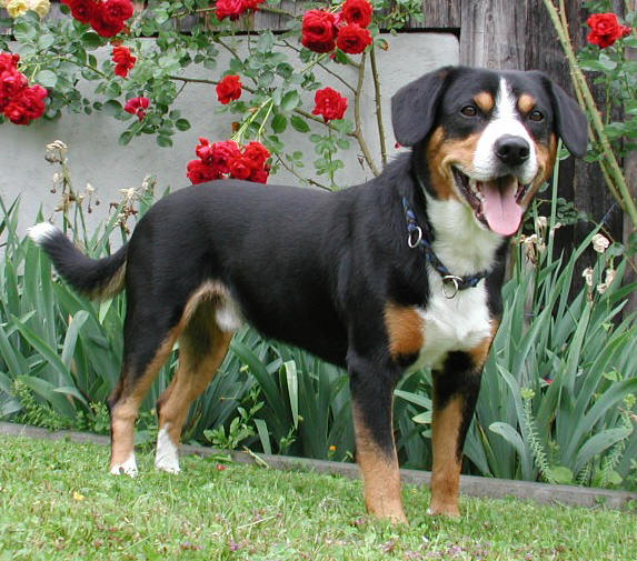 Entlebucher Zuchtrüde